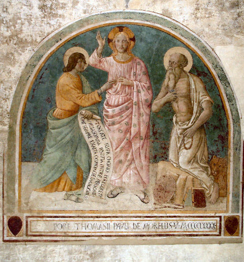 Incredulità di San Tommaso, Palazzo Pretorio, Certaldo, Prov. Firenze